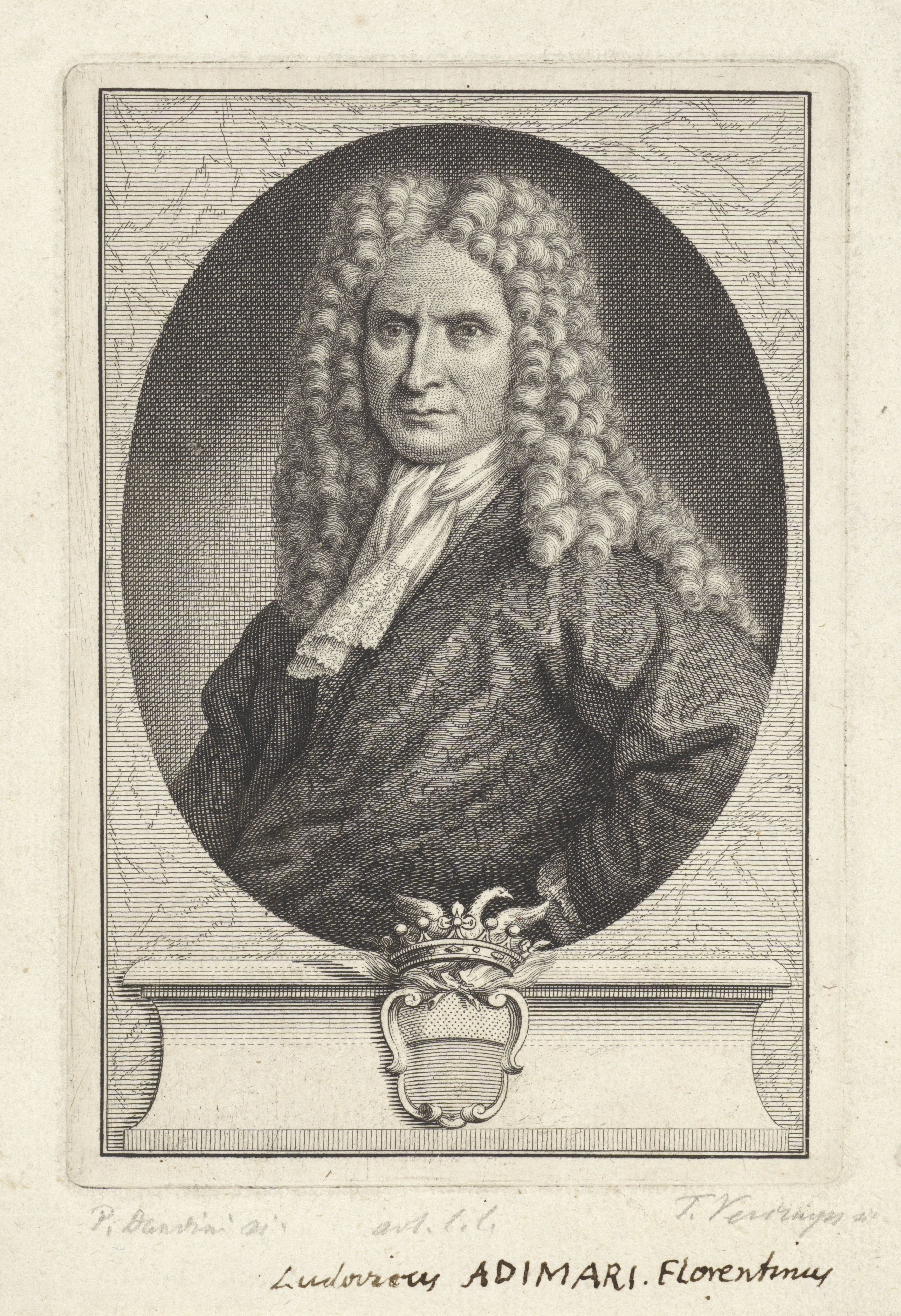 IdentificatieTitel(s): Portret van Ludovico AdimariObjecttype: prent Objectnummer: RP-P-1909-4568Opschriften / Merken: verzamelaarsmerk, verso, gestempeld: Lugt 2228naam, recto midden onder, handgeschreven: ‘Ludovicus Adimari Florentinus’Omschrijving: Portret van de Italiaanse dichter en toneelschrijver Ludovico Adimari.VervaardigingVervaardiger: prentmaker: Theodor Vercruys (vermeld op object)Plaats vervaardiging: ItaliëDatering: 1690 - 1739Fysieke kenmerken: ets en gravure, proefdrukMateriaal: papier Techniek: etsen / graveren (drukprocedé)Afmetingen: plaatrand: h 164 mm × b 114 mmOnderwerpWie: Ludovico AdimariVerwerving en rechtenVerwerving: aankoop 1905Copyright: Publiek domein